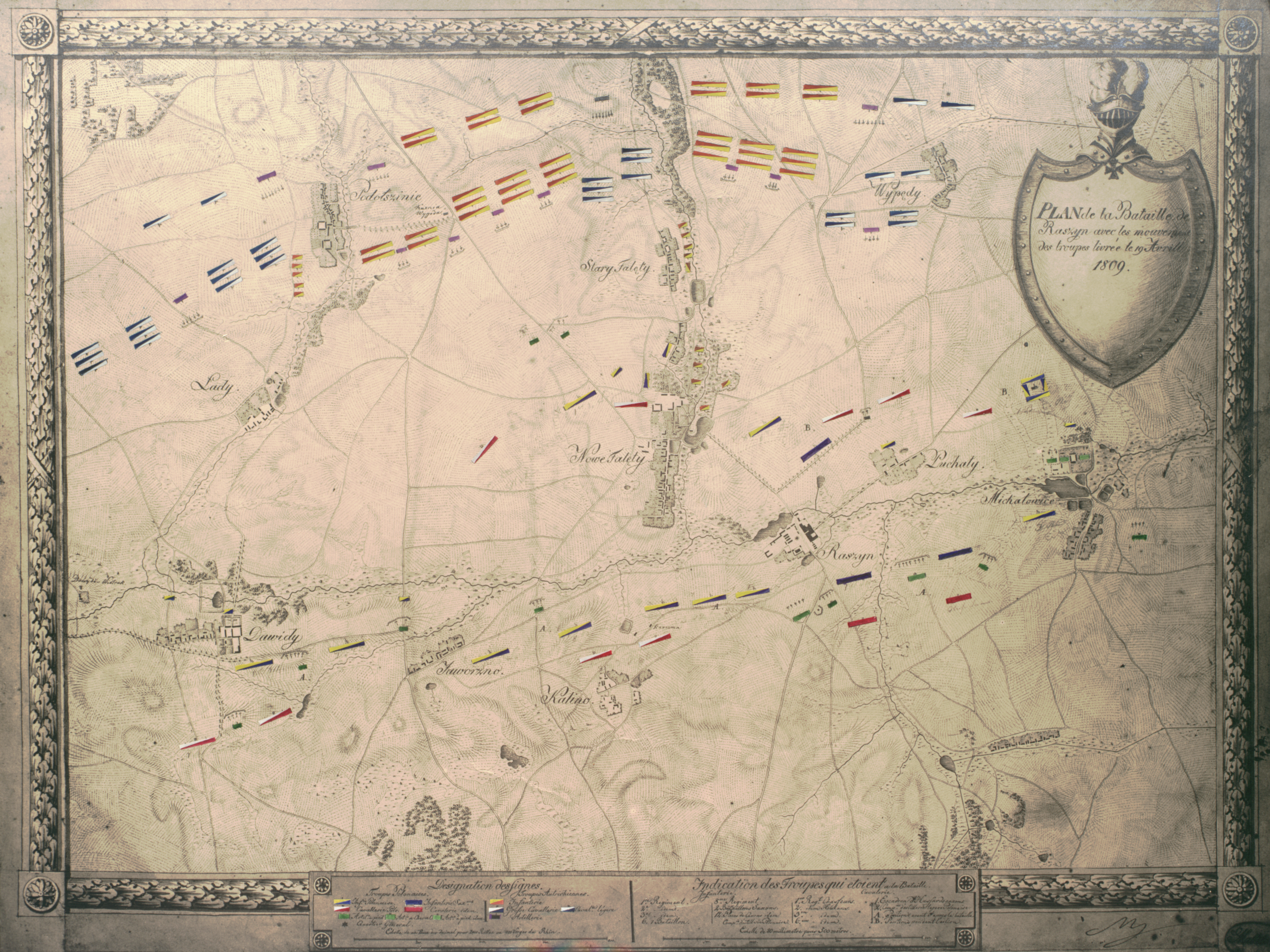 Plan bitwy 19 kwietnia 1809 roku